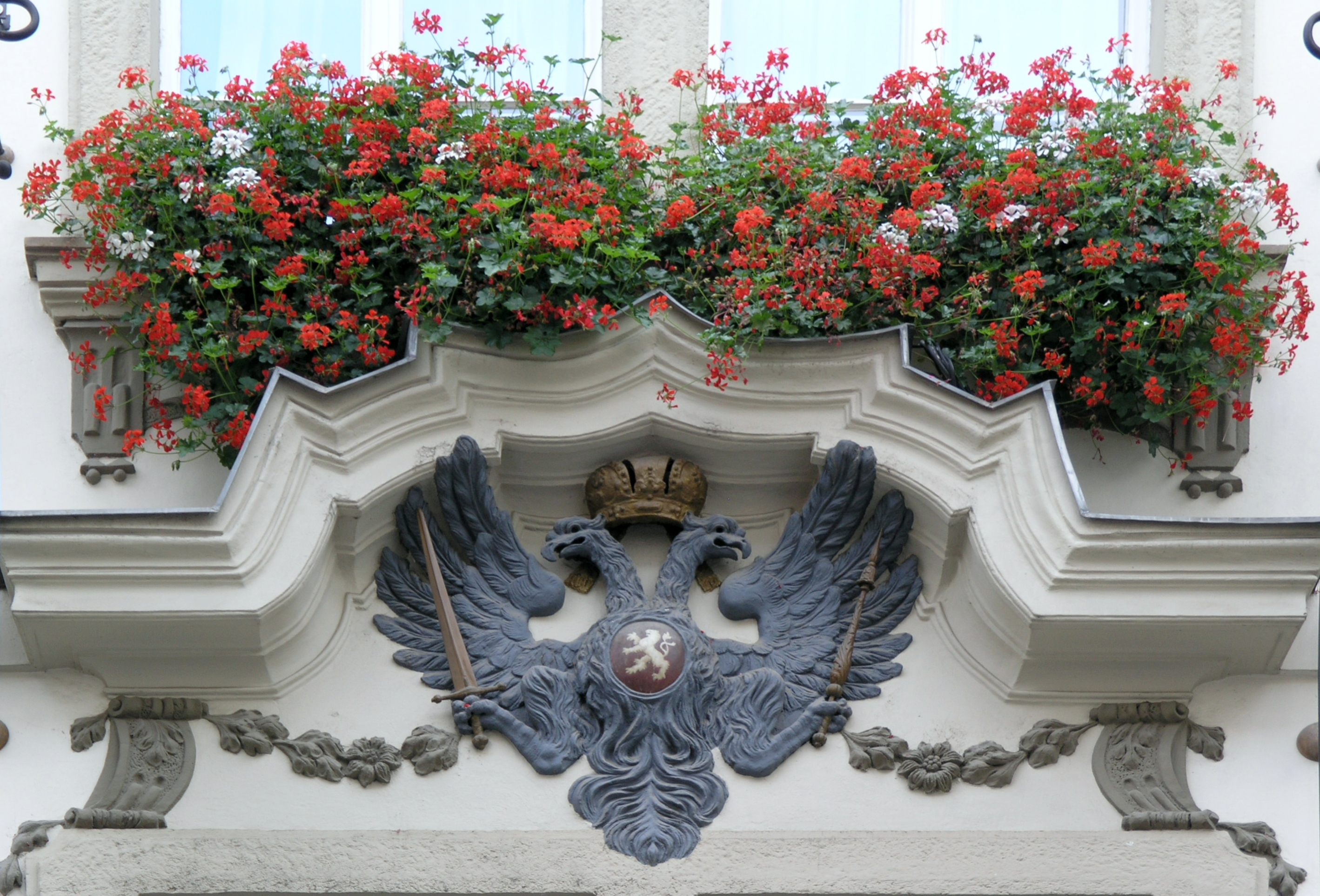 Praha, Malá Strana - Mostecká 11, U černého orla (domovní znamení)